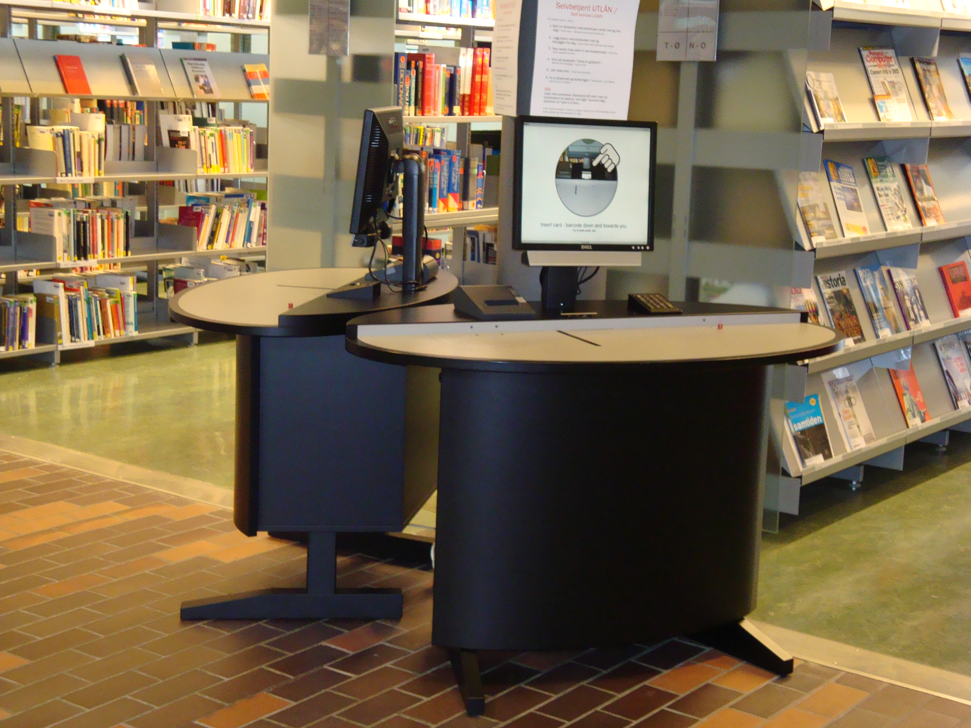 Bilde fra Universitetsbiblioteket i Stavangers avdeling på Ullandhaug